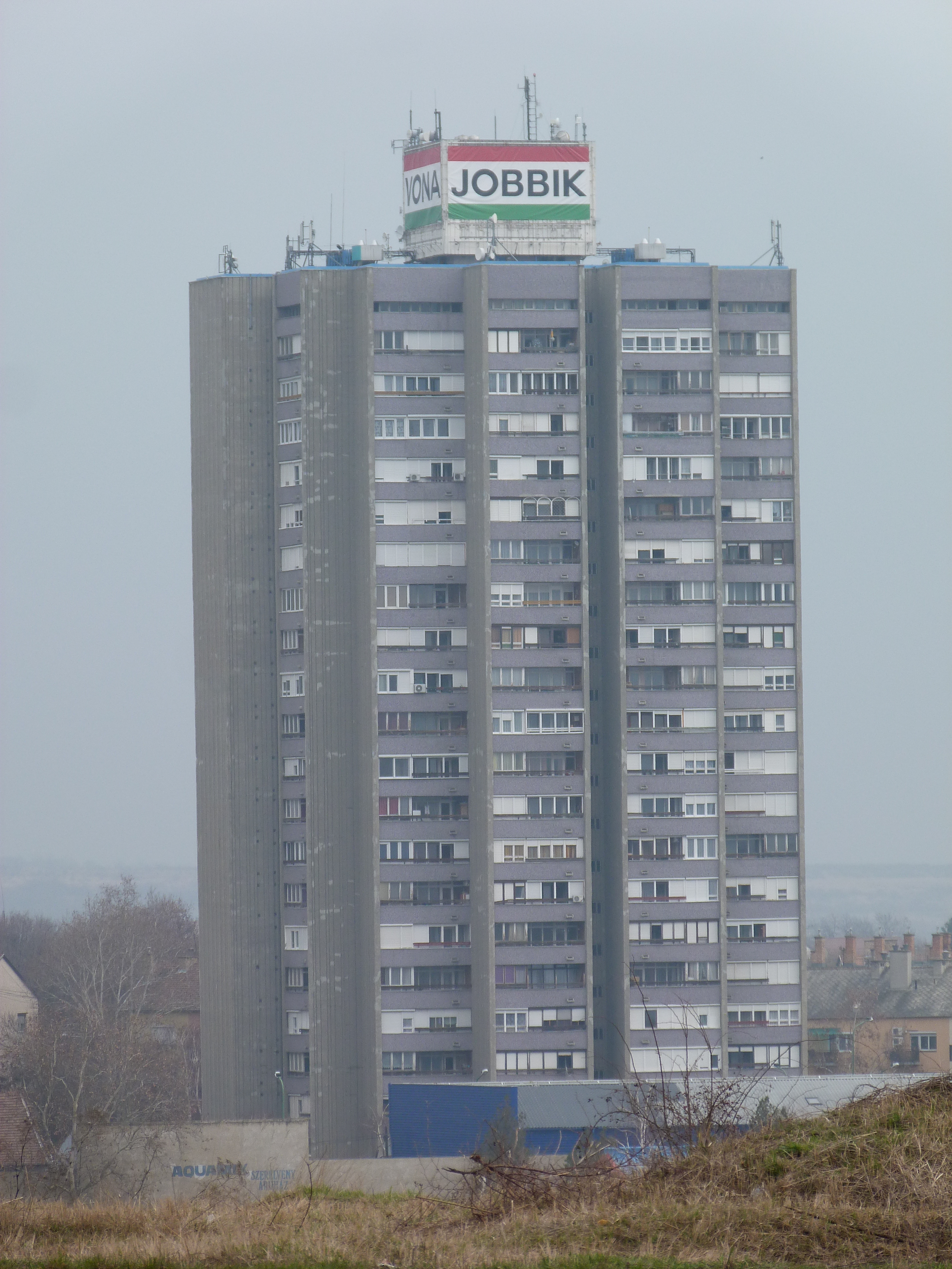 A felvétel 2014. február 28 -án készült Gyöngyösön. Pokoli torony. ©© Derzsi Elekes Andor, Budapest, 2014, You are authorised to use these photos and vids under Creative Commons – even for commercial, for profit purposes. Photos must be attributed to Derzsi Elekes Andor. All of the photos and vids in the Metapolisz DVD line are under Creative Commons and can be used even for commercial – for profit – purposes. Recommended Citation Derzsi Elekes Andor: Metapolisz DVD line